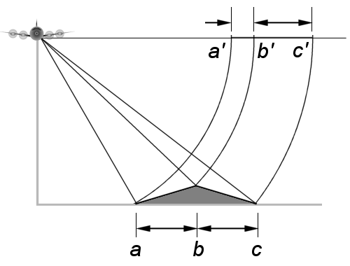 Durch ein Seitensichtradar entstehen bei der Darstellung von Höhenunterschieden Verzerrungen im Bild.